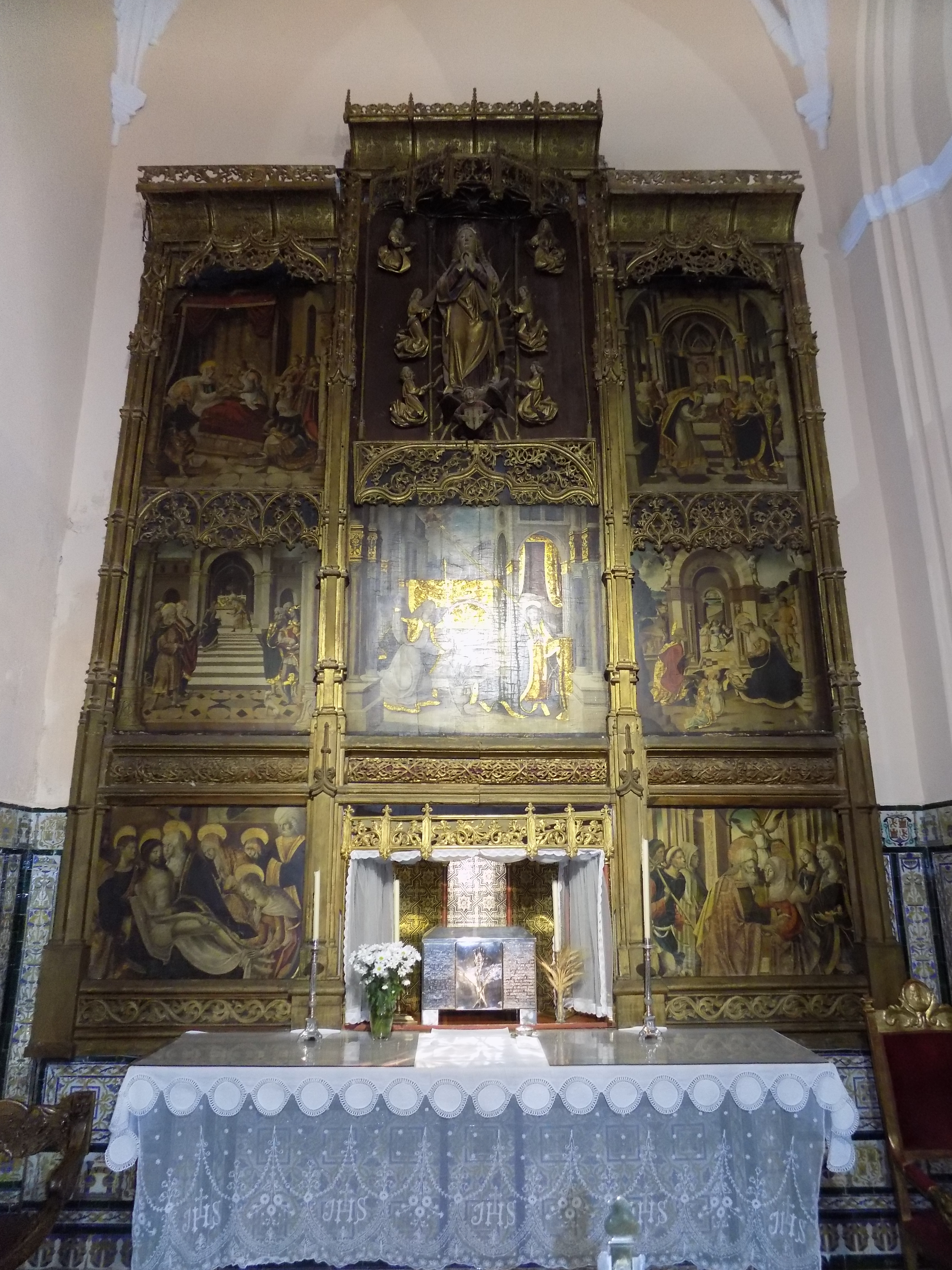 Retablo de la Capilla del Sagrario de la iglesia de Nuestra Señora del Castillo de Fuente Obejuna, provincia de Córdoba, (España).